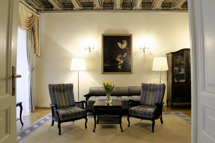 Grand Hotel Kraków.